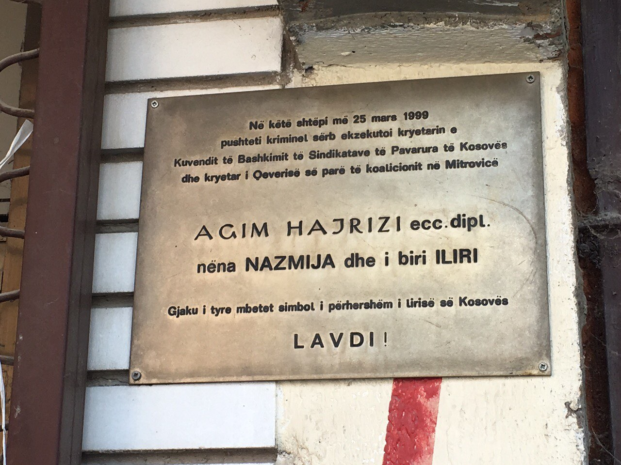 Pllaka Përkujtimore te Shtëpia e Agim Hajrizit, Mitrovicë.